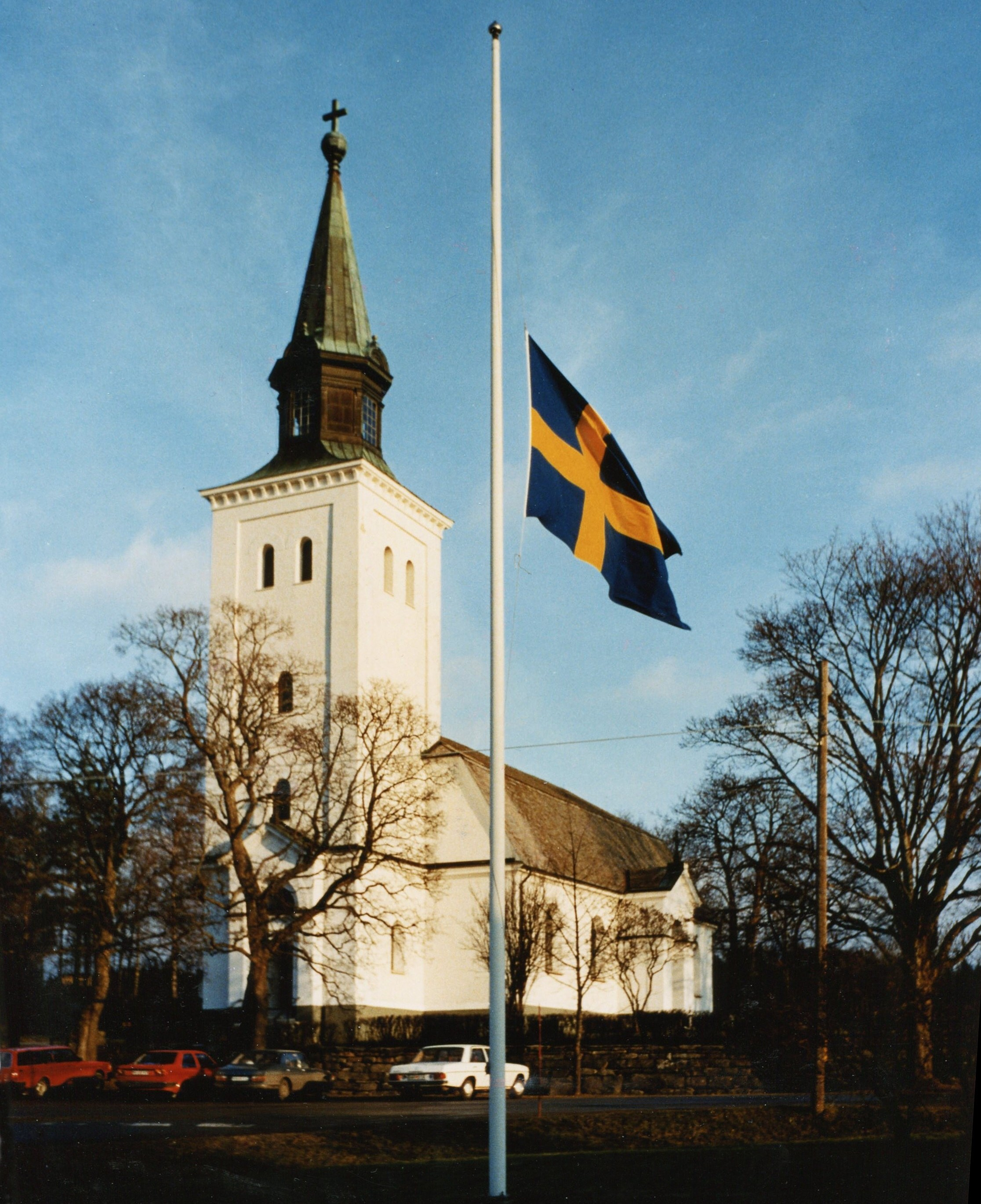 Glava kyrka i Värmland, Sverige.